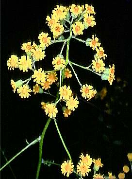 Sicilian botanical endemisms Senecio ambiguus